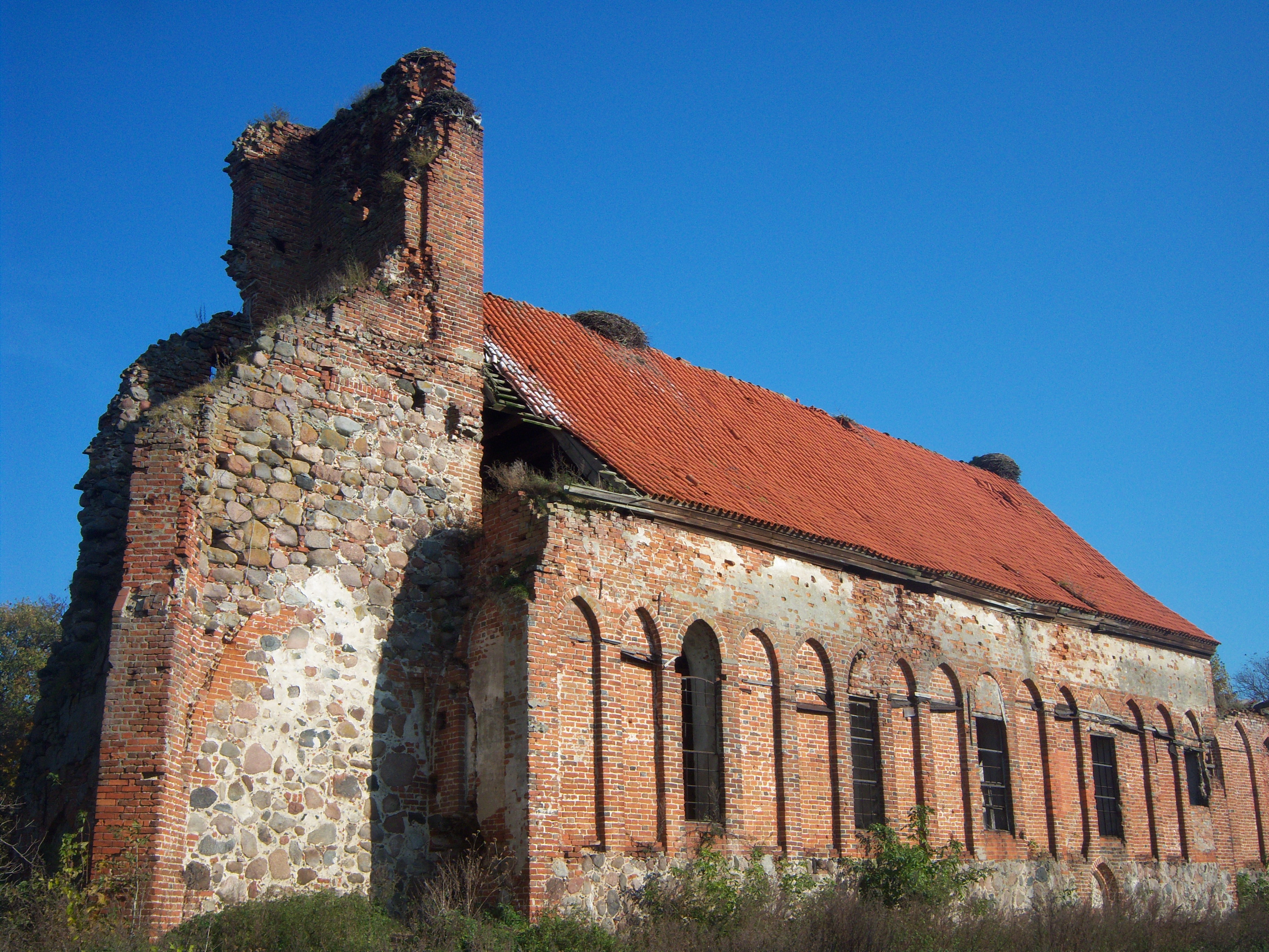 На фото кирха Куменен